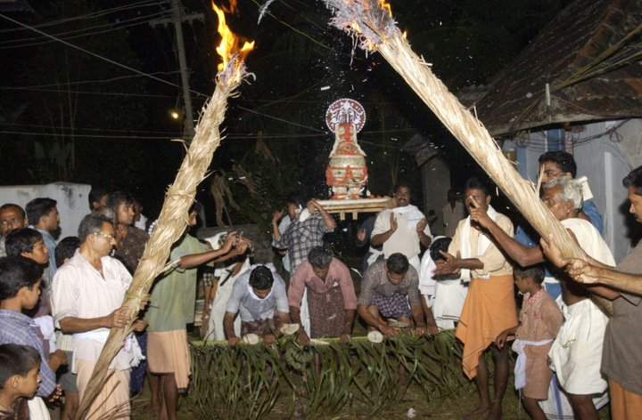 Neelamperoor Palli Bhagavathi Temple Vela